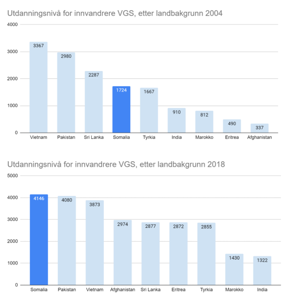 Utdanningsnivå videregående skole etter landbruk